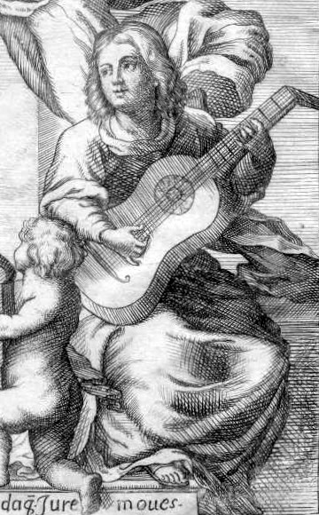 Recorte de la dedicatoria a Juan de austria del Instrucciòn de Mùsica sobre la Guitarra Española. Habitualmente se considera un grabado del autor del libro, Gaspar Sanz.